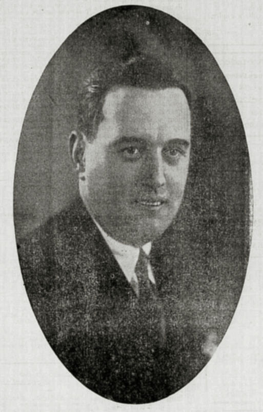 Dante Marcucci